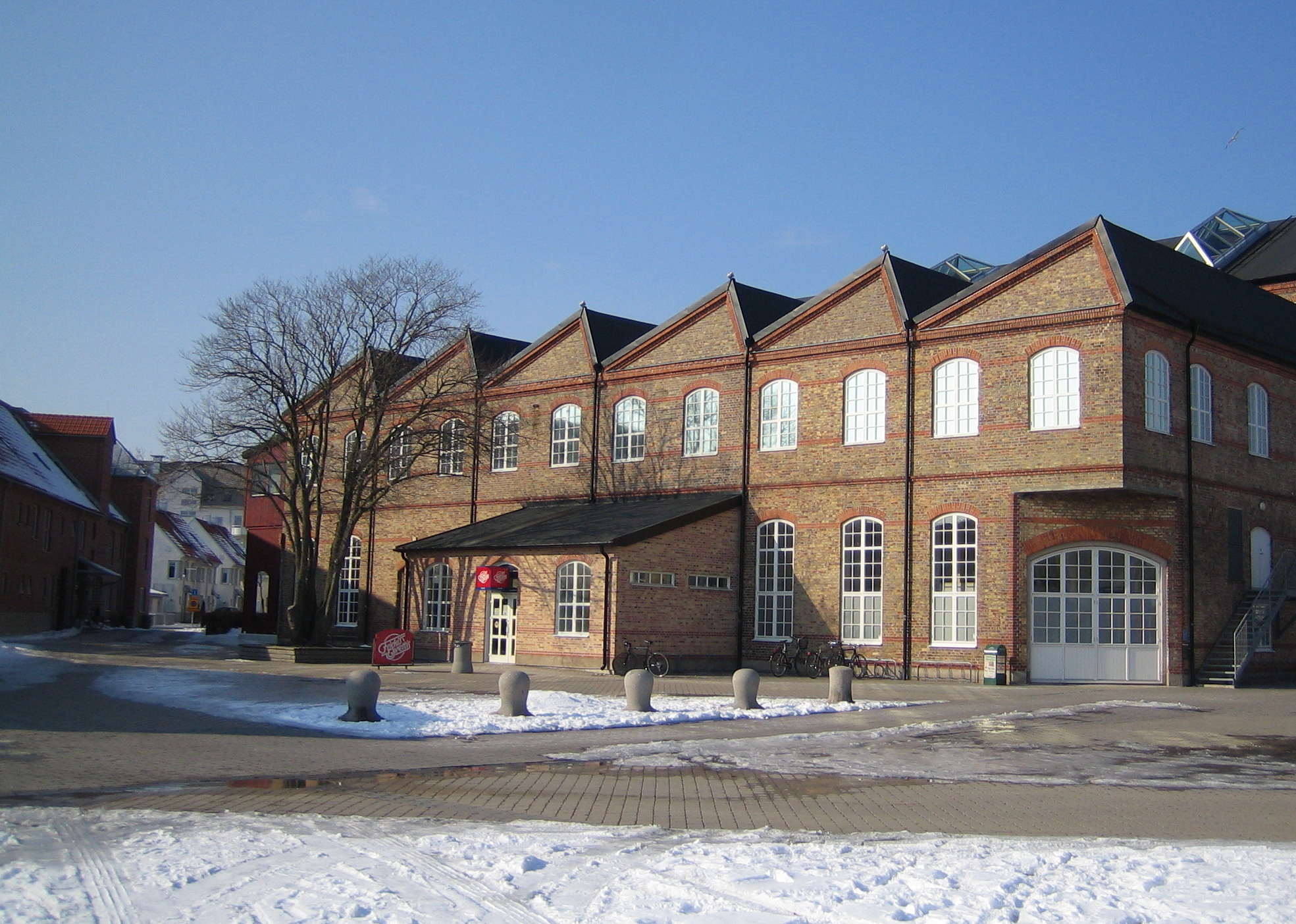 Före detta fabrikslokal, sedermera Friskis och Svettis, på Ön i Limhamn.